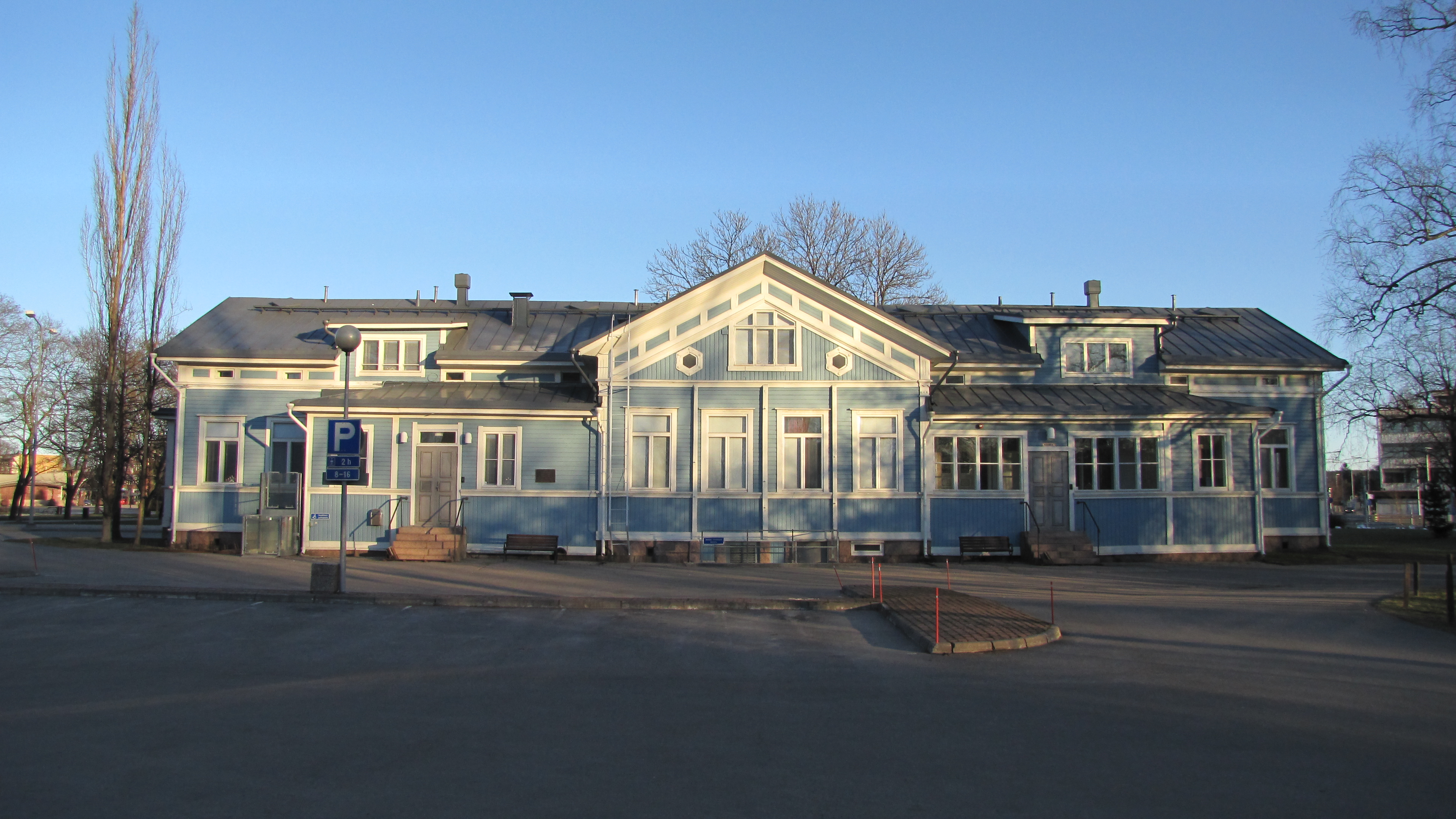 Salon kaupungintalo Tehdaskatu 1